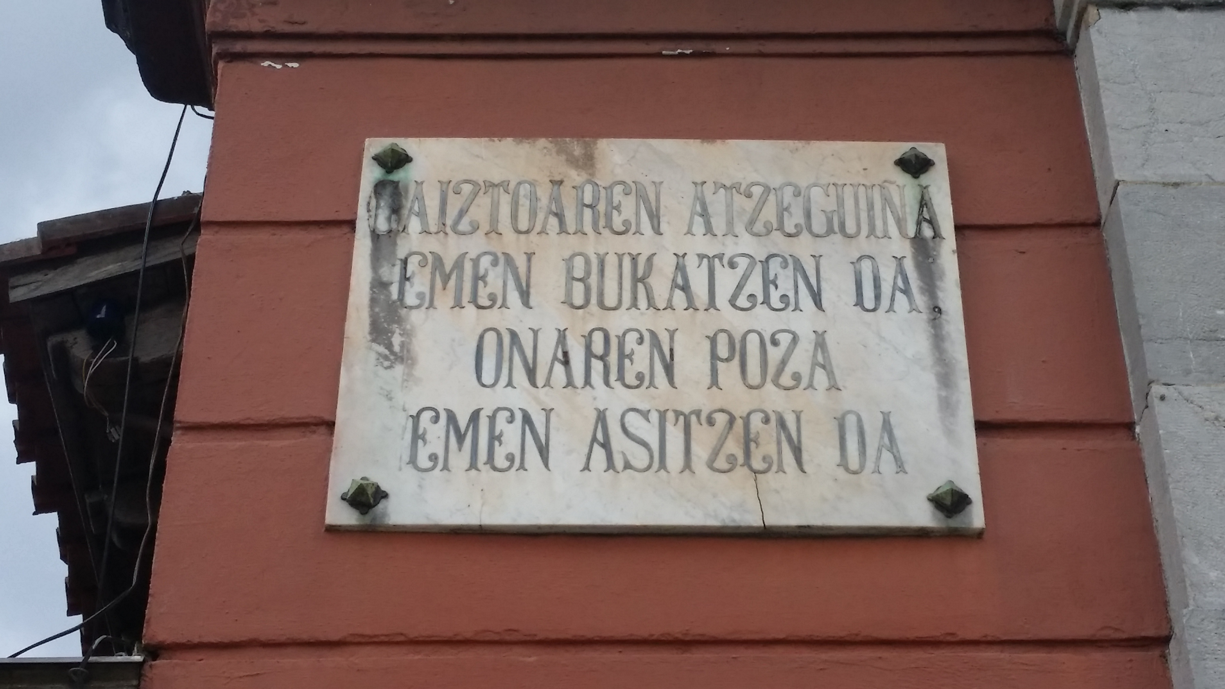 San Blas hilerriko plaka